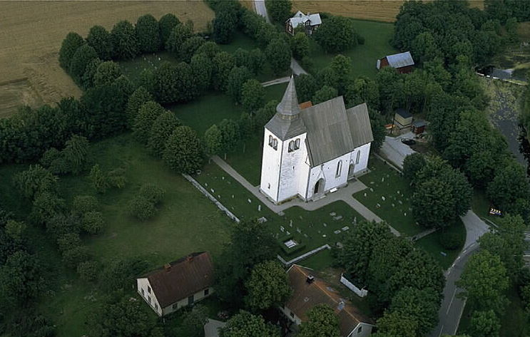 Motiv: Hörsne kyrka Nyckelord: Flygbilder, Riksintressen Kategori: KyrkomiljöHörsne kyrka